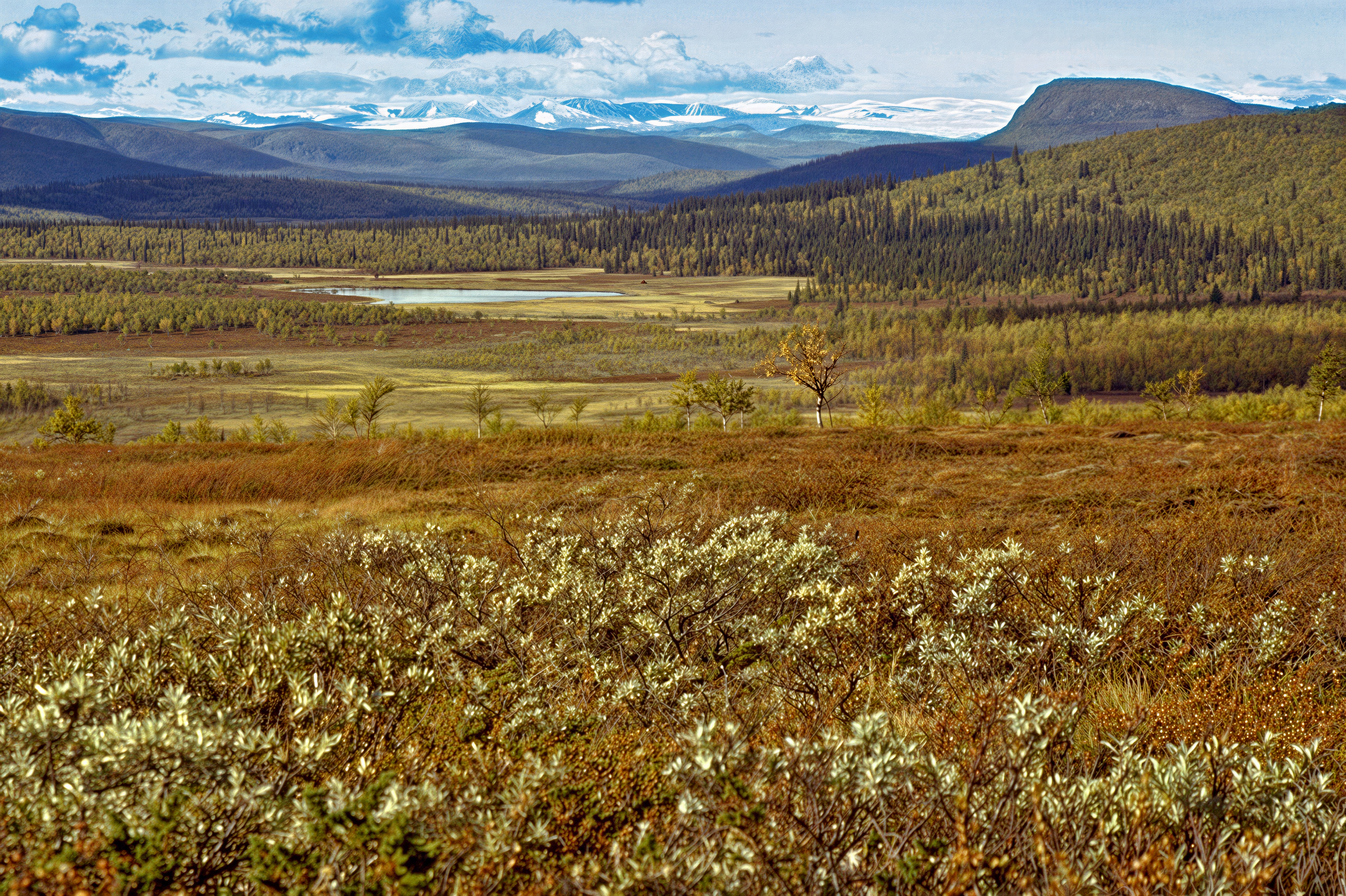 Blick vom Sjaunja Naturreservat Richtung Ritelpakte, im Hintergrund die Berge des Stora Sjöfallet-Nationalparks